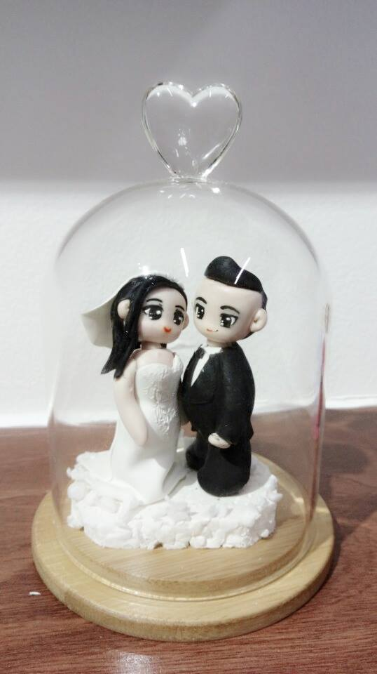 Đất sét tự khô dùng nặn tượng chibi